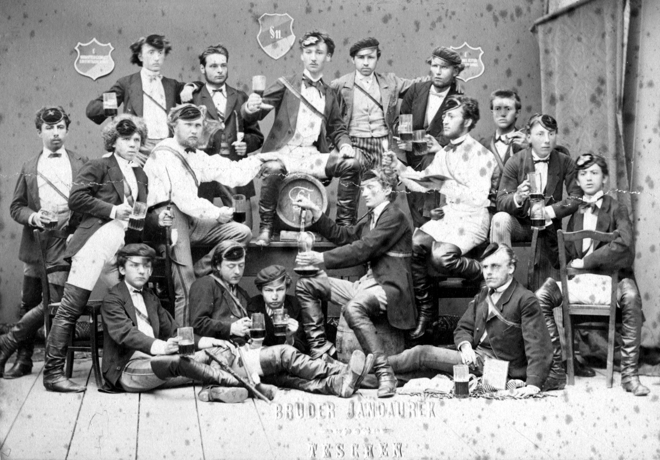 Die Pennale Burschenschaft Silesia Teschen